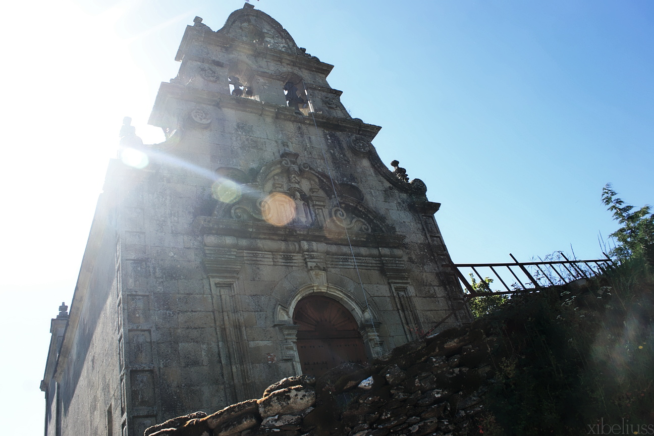 Portada de la iglesia de San Ciprián de Hermisende